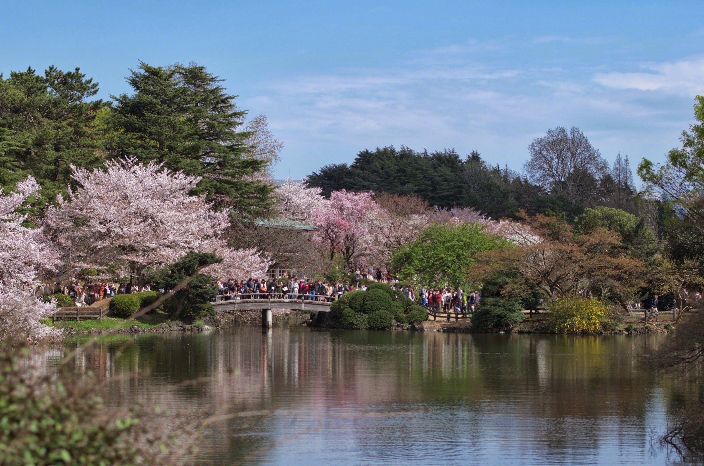 Shinjuku Gyoen(Shinjuku Imperial Garden) / 新宿御苑